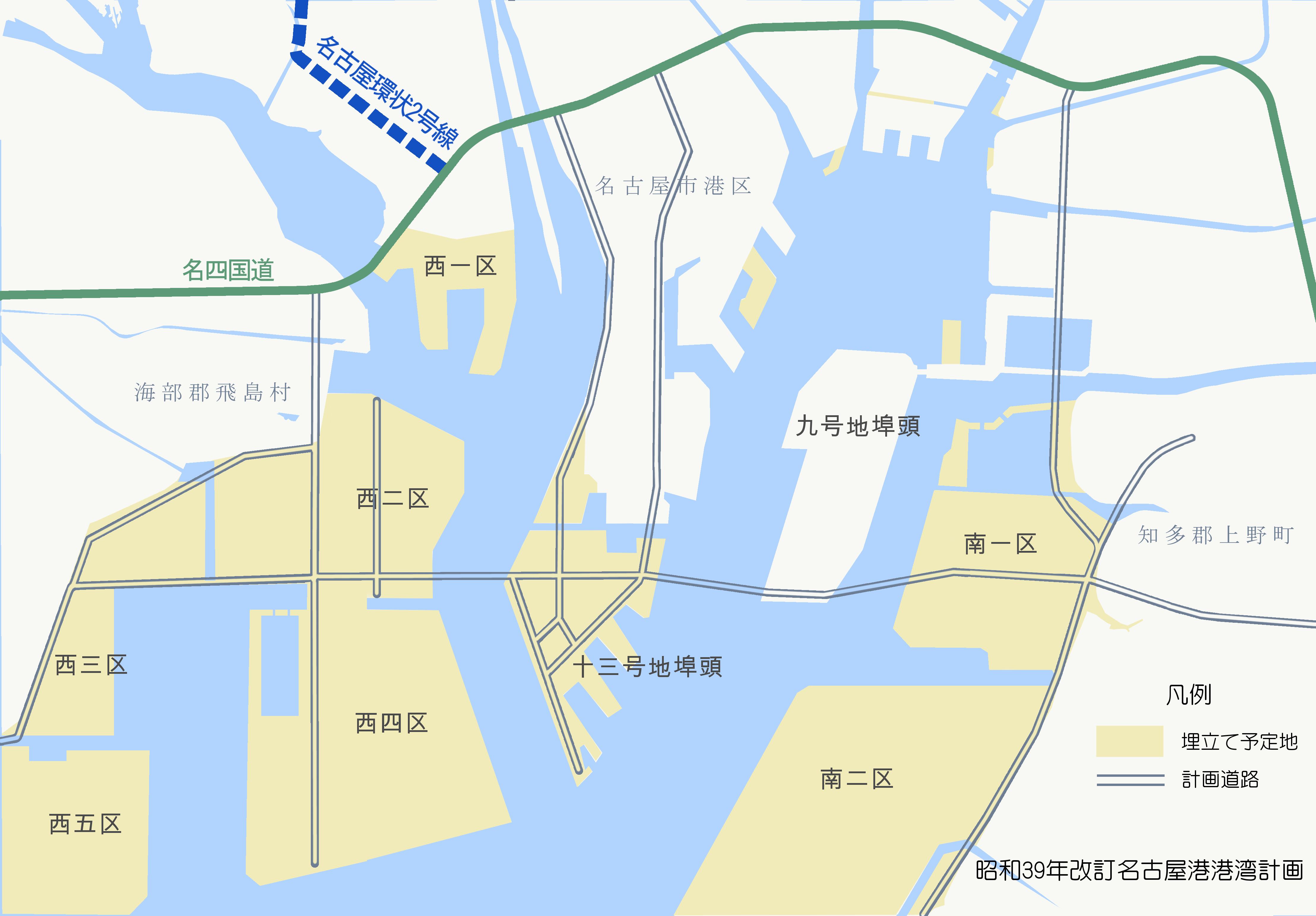 1964年5月改訂名古屋港港湾計画（出典:名古屋都市計画のあらまし No.1-10 1962-80合冊製本内の「都市計画のあらまし」 1968 No.3、36頁、名古屋都市センターまちづくりライブラリー蔵）